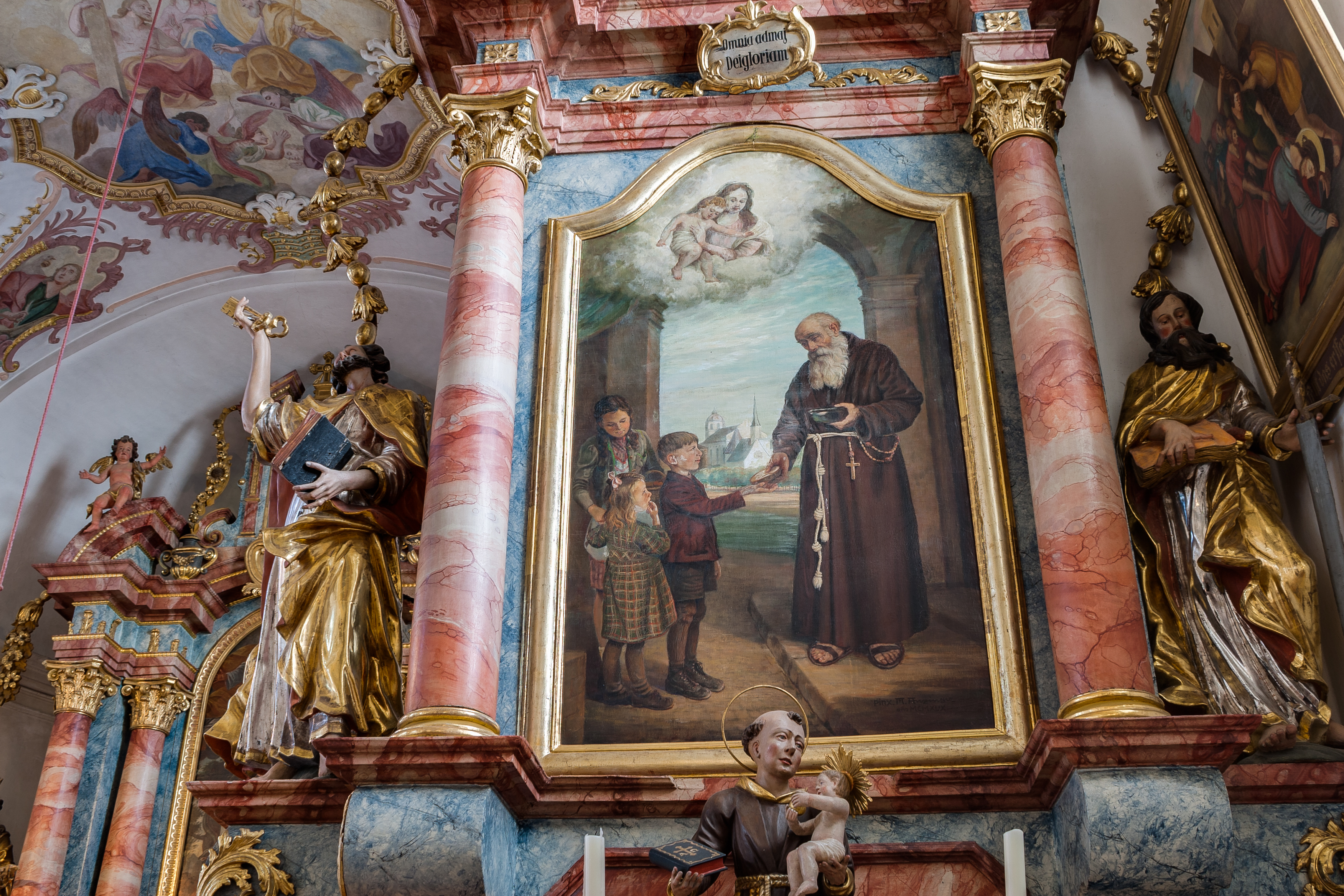 Nahansicht des Philipp- und Jakob-Altars der Pfarr- und Wallfahrtskirche Antwort, einem Ortsteil von Bad Endorf. Der Altar wurde 1715 erschaffen, vermutlich von Joseph Wolf, Bildhauer in Rosenheim. Das Altarblatt stellt den Heiligen Bruder Konrad dar, 1949 erstellt durch den Halfinger Maler Martin Anzinger (1905–1987). Die Seitenfiguren, die Apostel Petrus und Paul darstellend, wurden ebenfalls um 1715 durch Joseph Wolf erstellt. Die Statue des Heiligen Antonius von Padua auf dem Altar ist eine Arbeit aus der zweiten Hälfte des 17. Jahrhunderts. (Siehe Peter von Bomhard, Die Kunstdenkmäler der Stadt und des Landkreises Rosenheim, II. Teil, S. 209–210.)